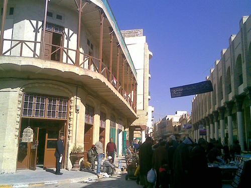 shahbandar, Baghdad